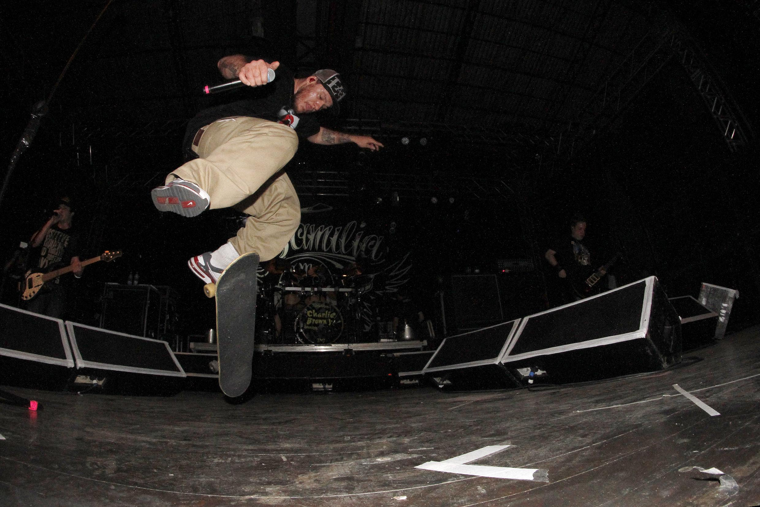 A banda Charlie Brown Junior em 20 de Outubro de 2012 durante o seu show de lançamento do CD e DVD “Música Popular Brasileira”. Foto: Guilherme Testa